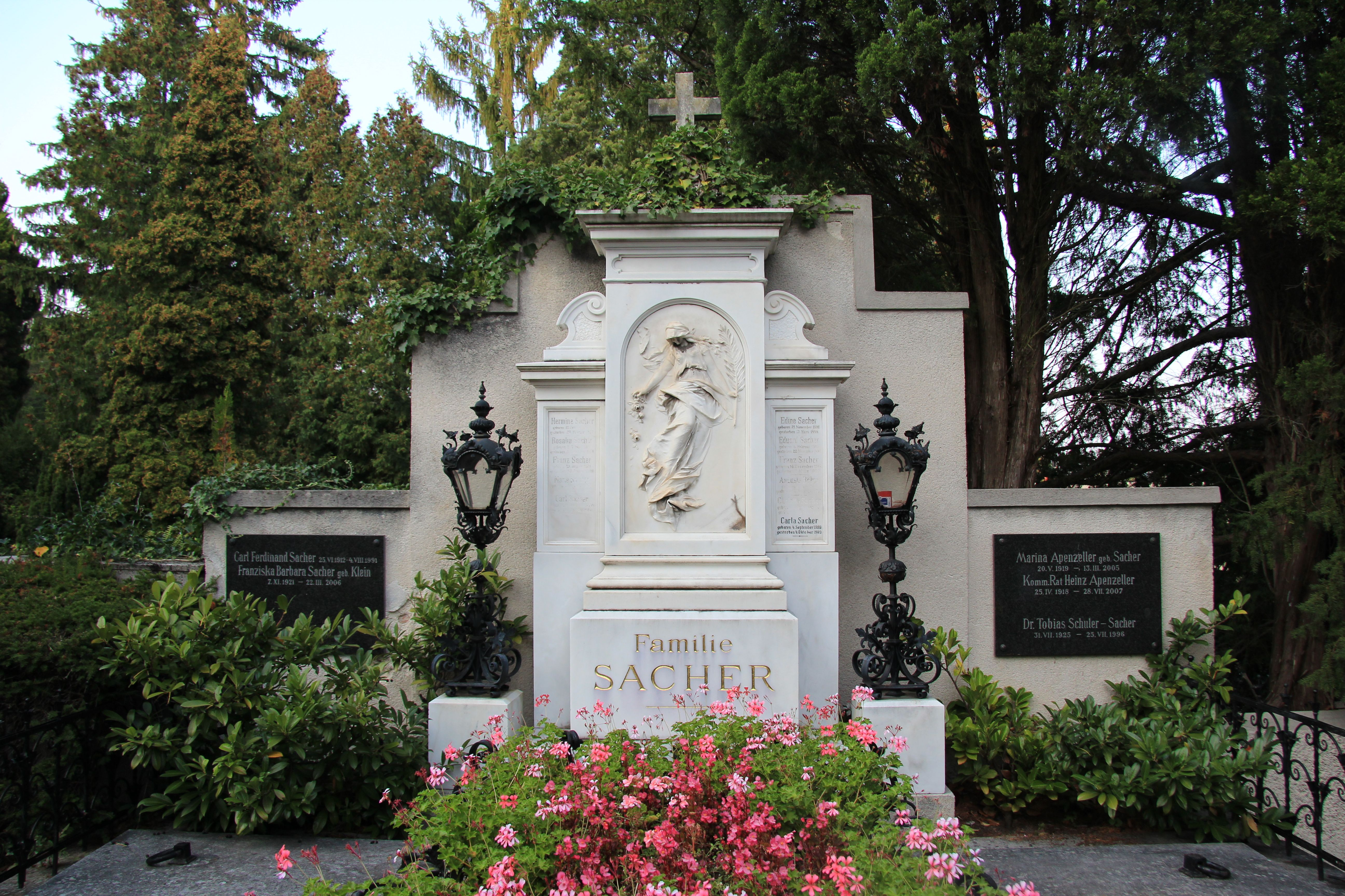 Helenenfriedhof samt Kapelle, Grab der Familie Sacher